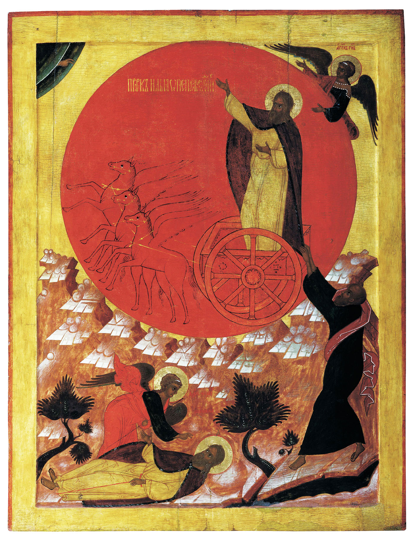 Пророк Илья. Огненное восхождение. 1570-е годы. Церковь Великого Устюга. Дерево, левкас, темпера.